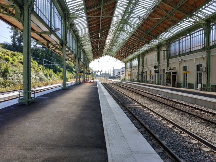 Les voies et les quais rénovés.